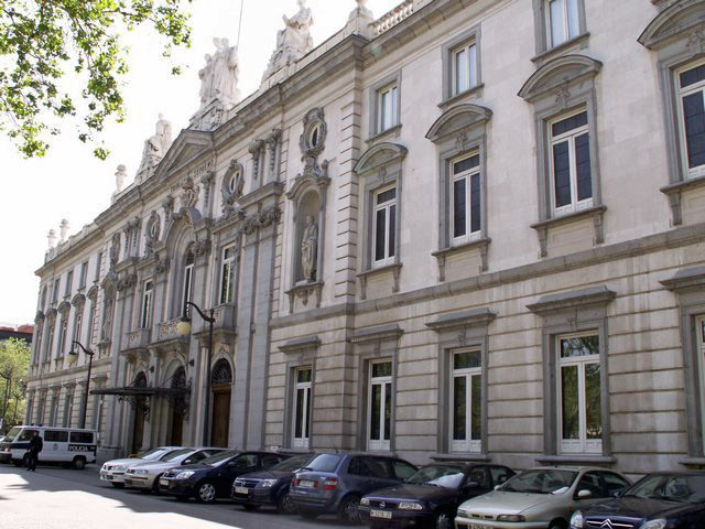 Tribunal Supremo de España. Plaza de la Villa de París (Madrid). Antiguo Monasterio de la Visitación de las Salesas Reales. Proyecto inicial de 1749 de Carlier y realización de Francisco Moradillo entre 1750-1758. Reforma en Tribunal en 1870. Forma conjunto con la Iglesia de las Salesas Reales